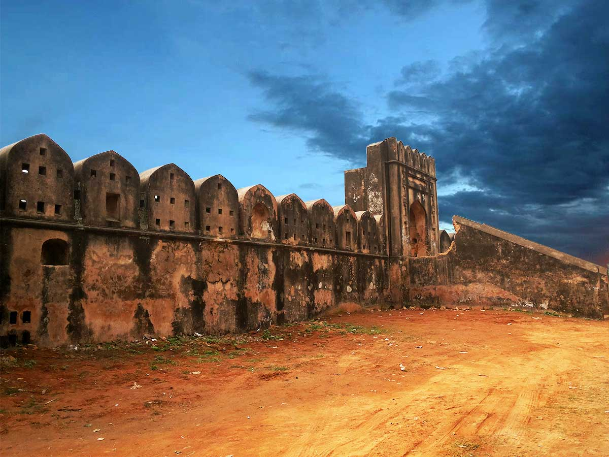 হাজীগঞ্জ দুর্গ মুঘল আমলে নির্মিত একটি জল দুর্গ। এটি বাংলাদেশের নারায়ণগঞ্জ জেলার হাজীগঞ্জ এলাকায় শীতলক্ষ্যা নদীর পশ্চিম তীরে অবস্থিত। এটি খিজিরপুর দুর্গ নামেও পরিচিত